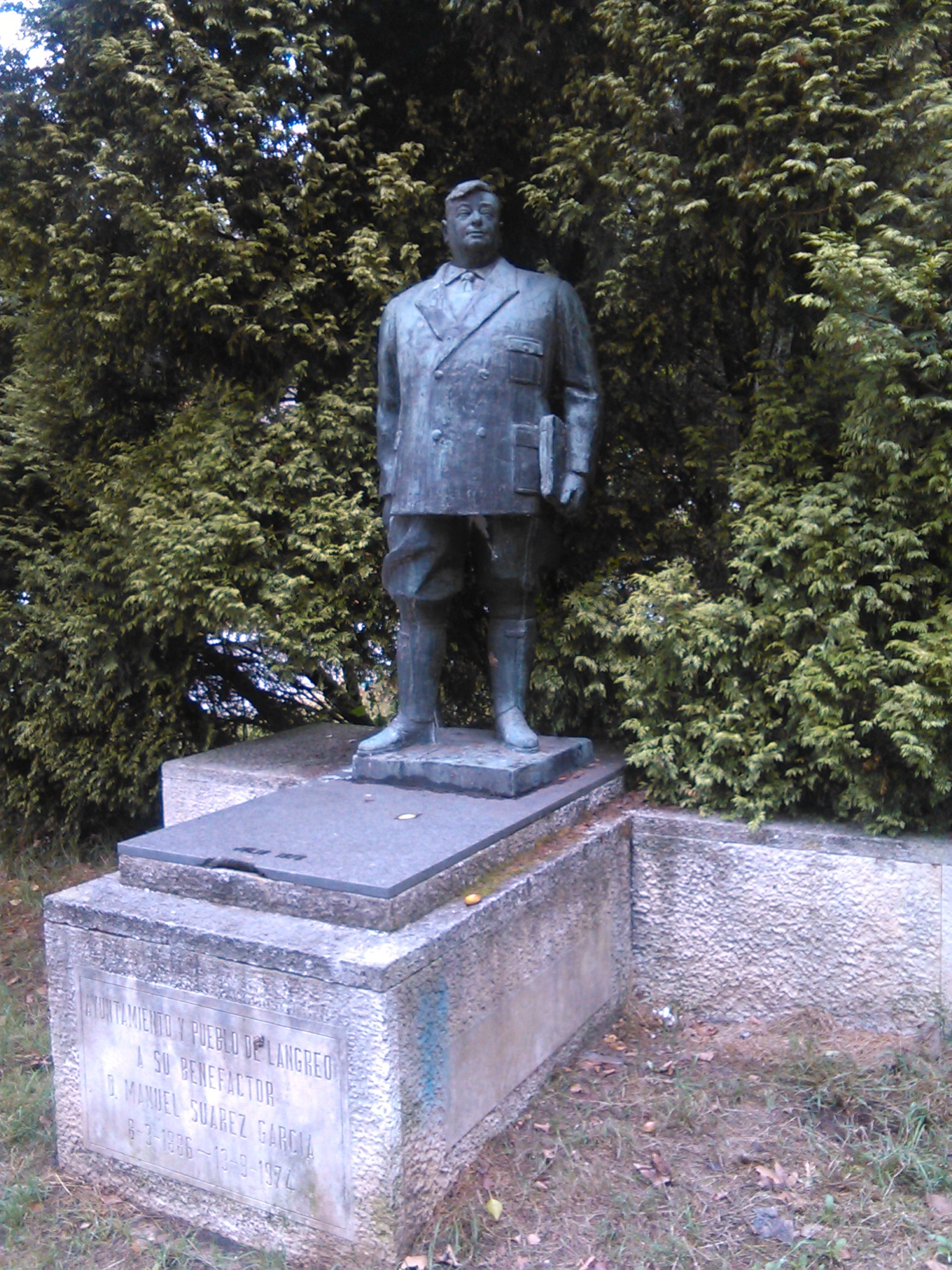 Monumento al empresario Manuel Suárez en el Parque Alcalde García Lago de La Felguera (Asturias, España)